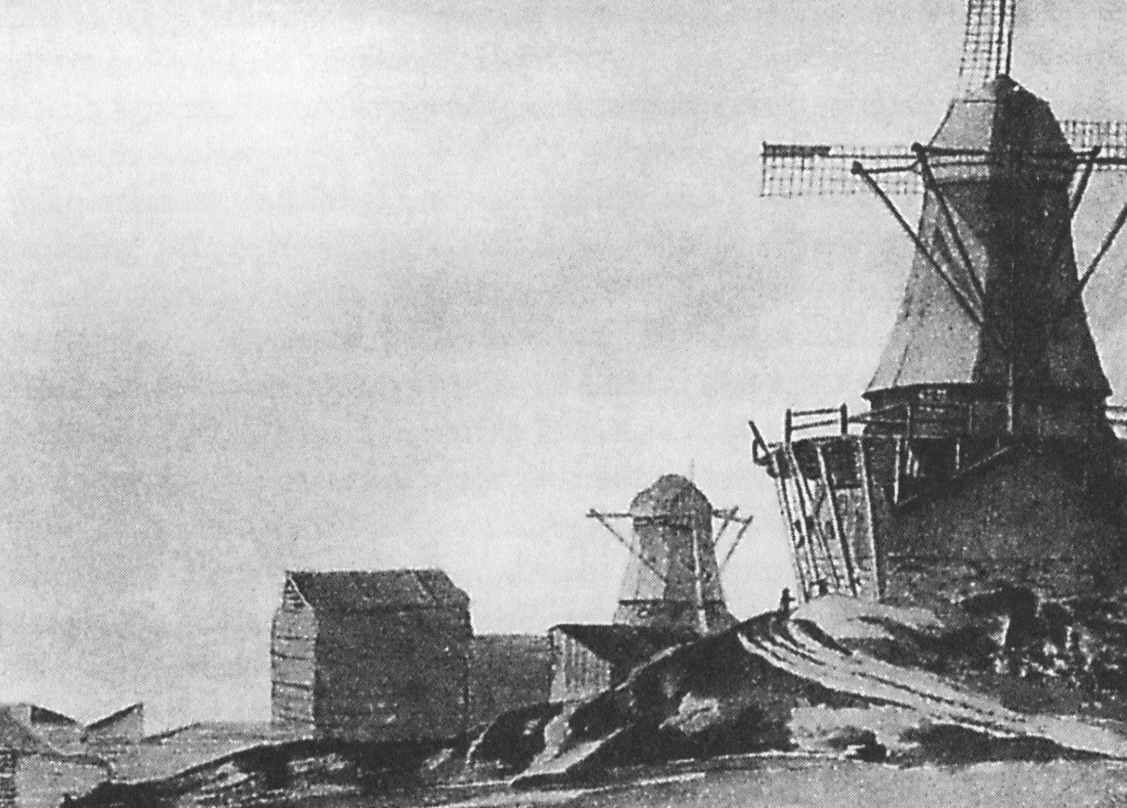 Kvarnarna vid Waldemarsudde lavyr av Tore Billing. I förgrunden oljekvarnen, i bakgrunden den 1849 nedbrunna sågkvarnen